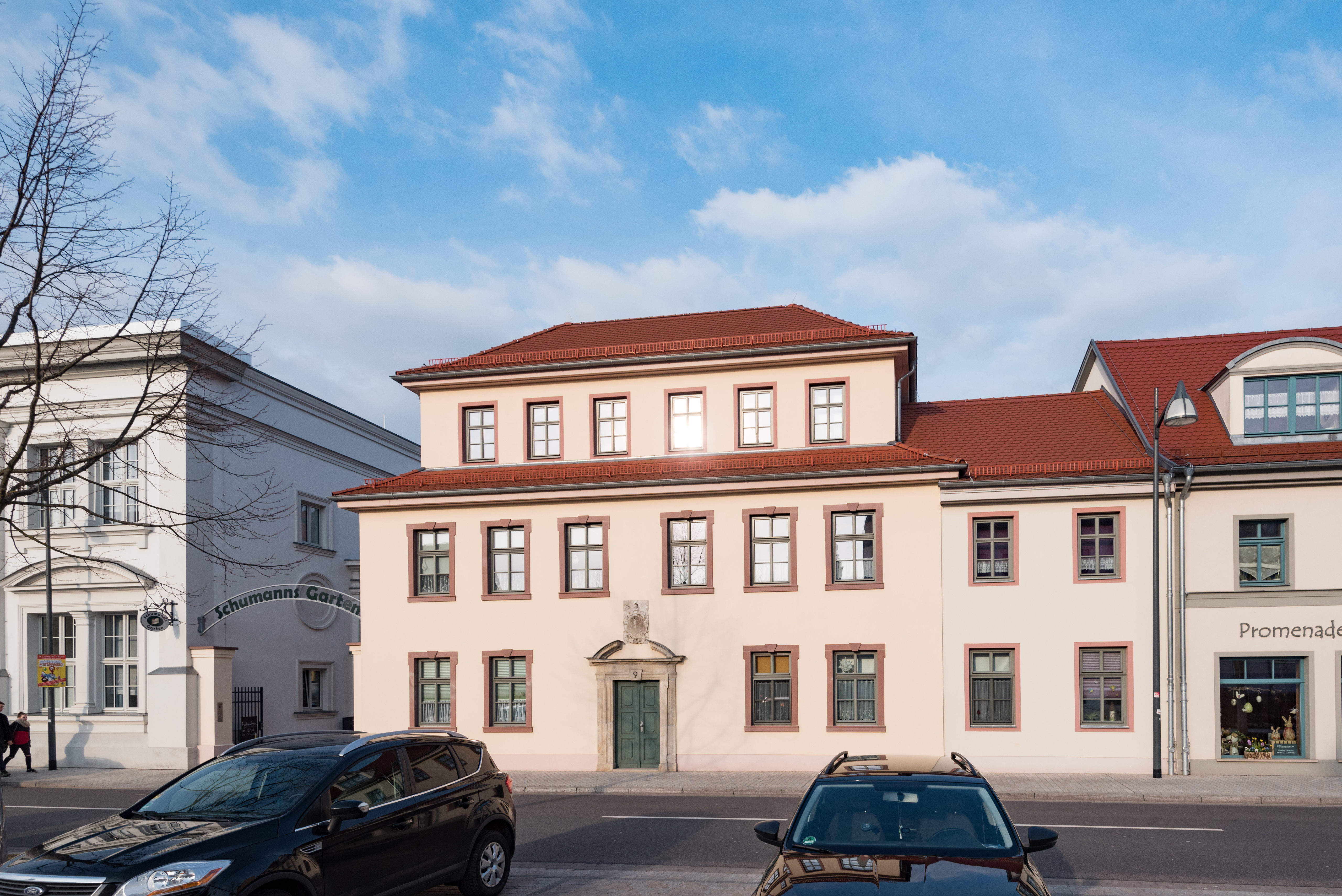 Weißenfels, Promenade 9